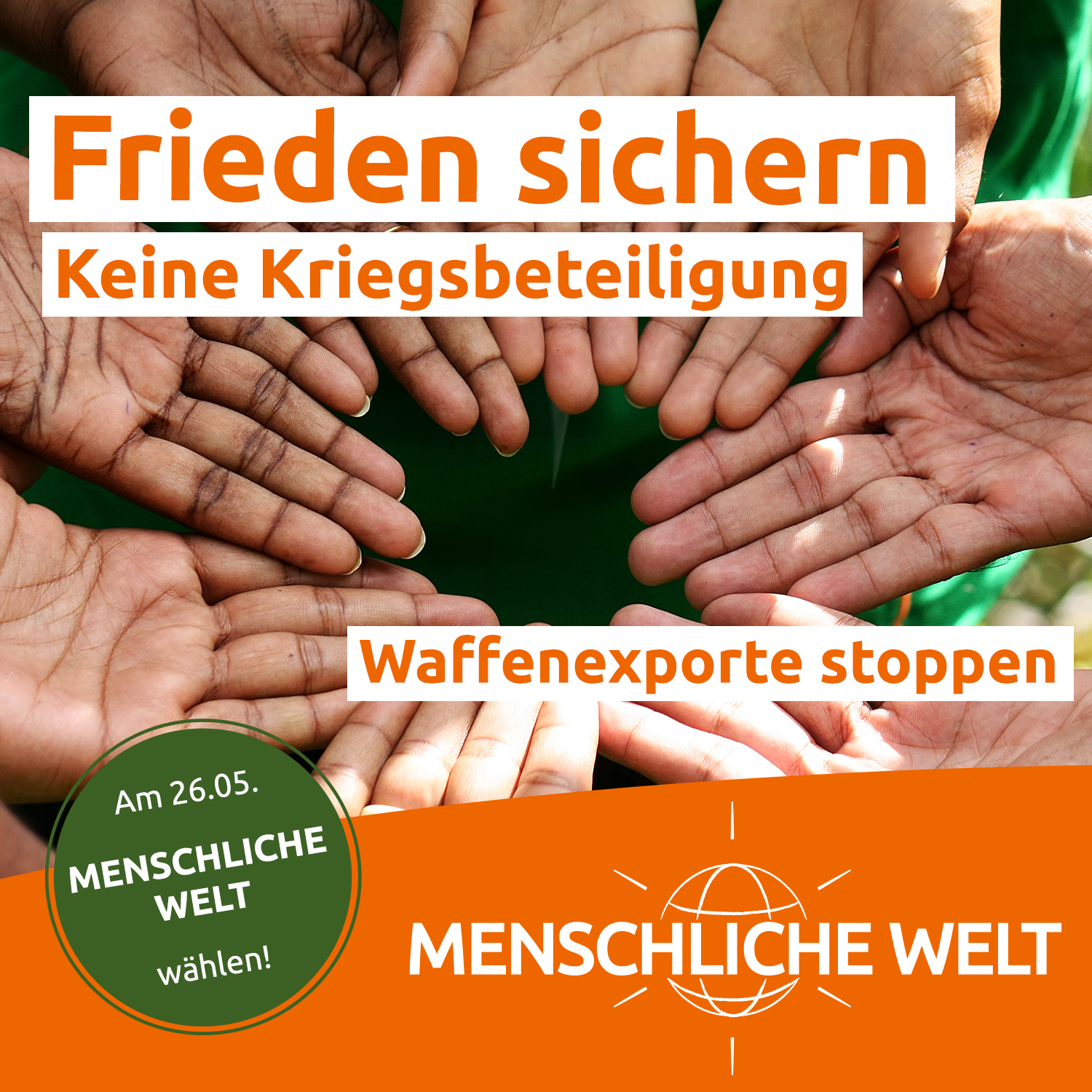 Online-Plakat zur Europawahl 2019. Thema: Friedenspolitik